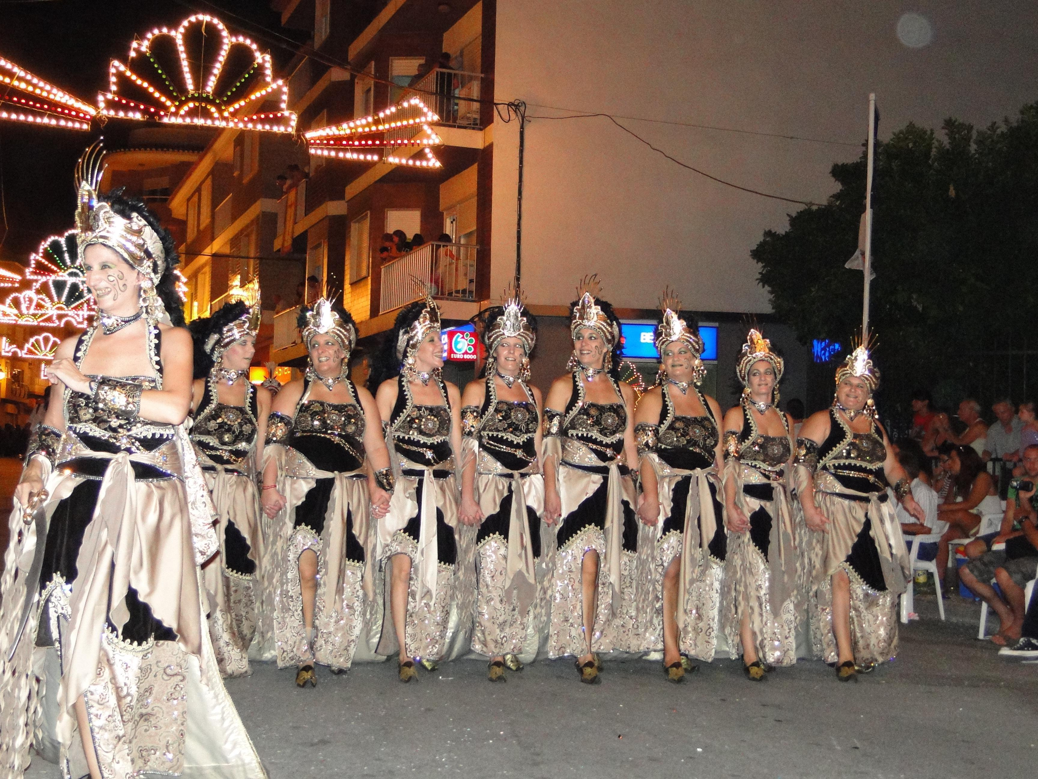 festes de Beniganim